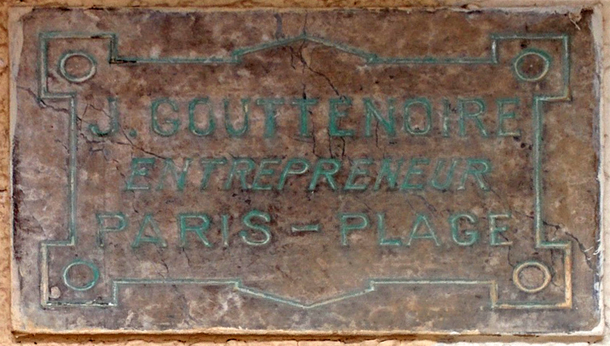 plaque de l'entreprise Gouttenoire posée sur la construction d'un bâtiment au Touquet-Paris-Plage